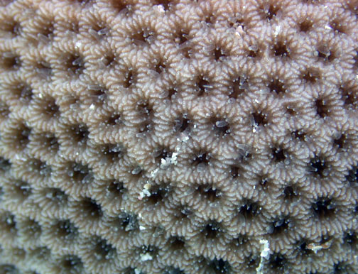 Goniastrea edwardsi, vista de coralitos en la superficie de la colonia. Samoa Americana